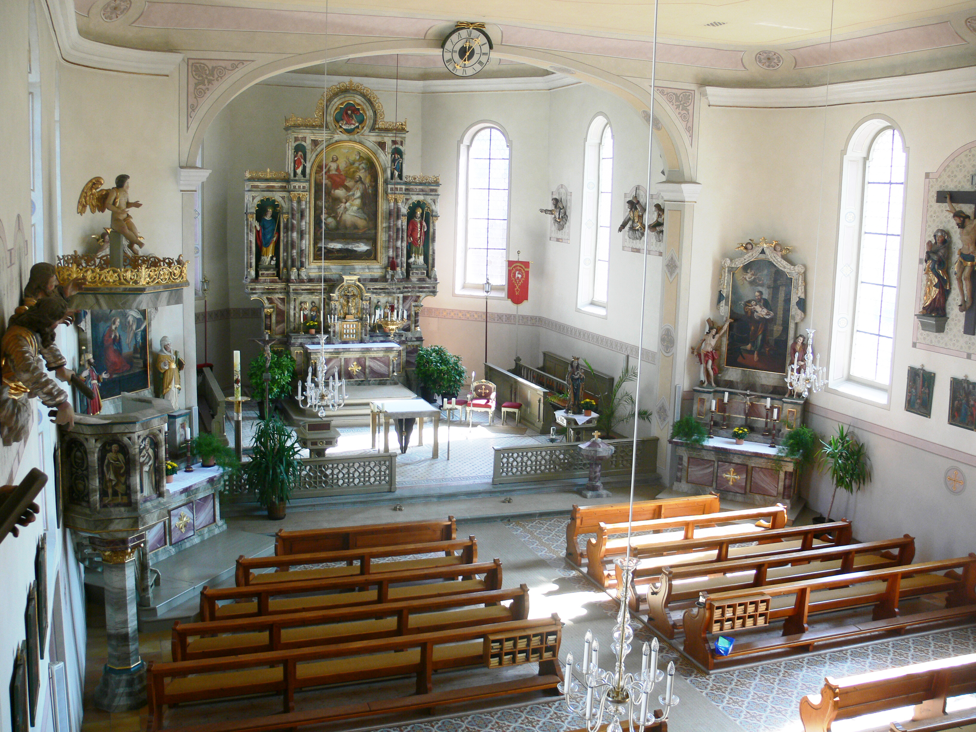 Pfarrkirche St. Gebhard, Maierhöfen (Allgäu)